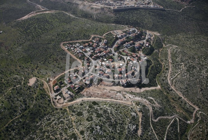 מבט אוירי על היישוב